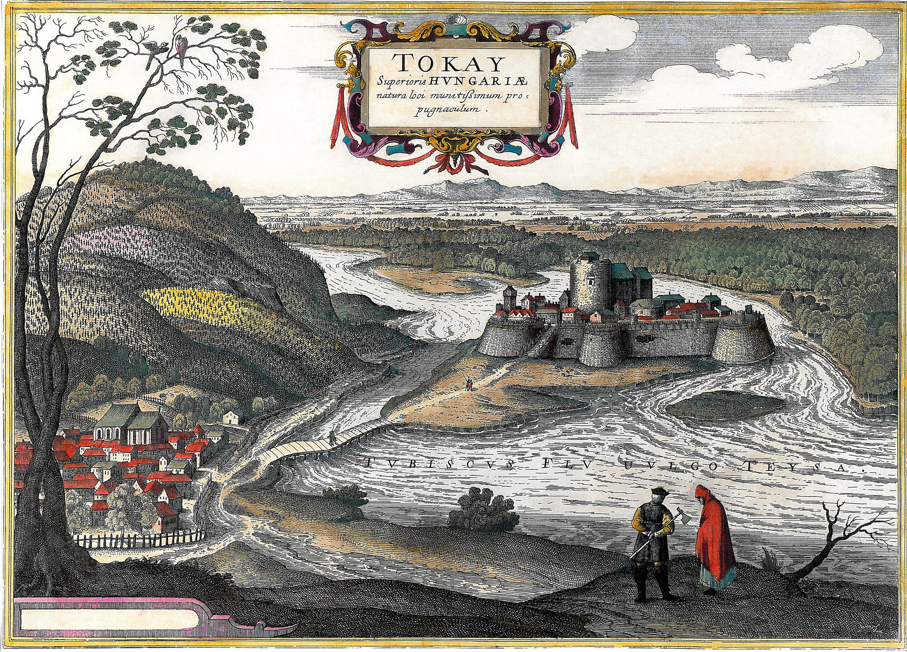 Tokaj G Hoefnagel metszetén, a XVI. század végén.